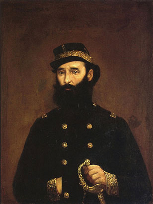 Retrato del Coronel Bartolomé Mitre, por Ignacio Manzoni.